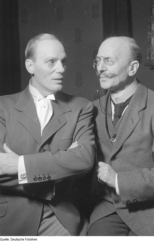 Original image description from the Deutsche Fotothek Szenenbilder